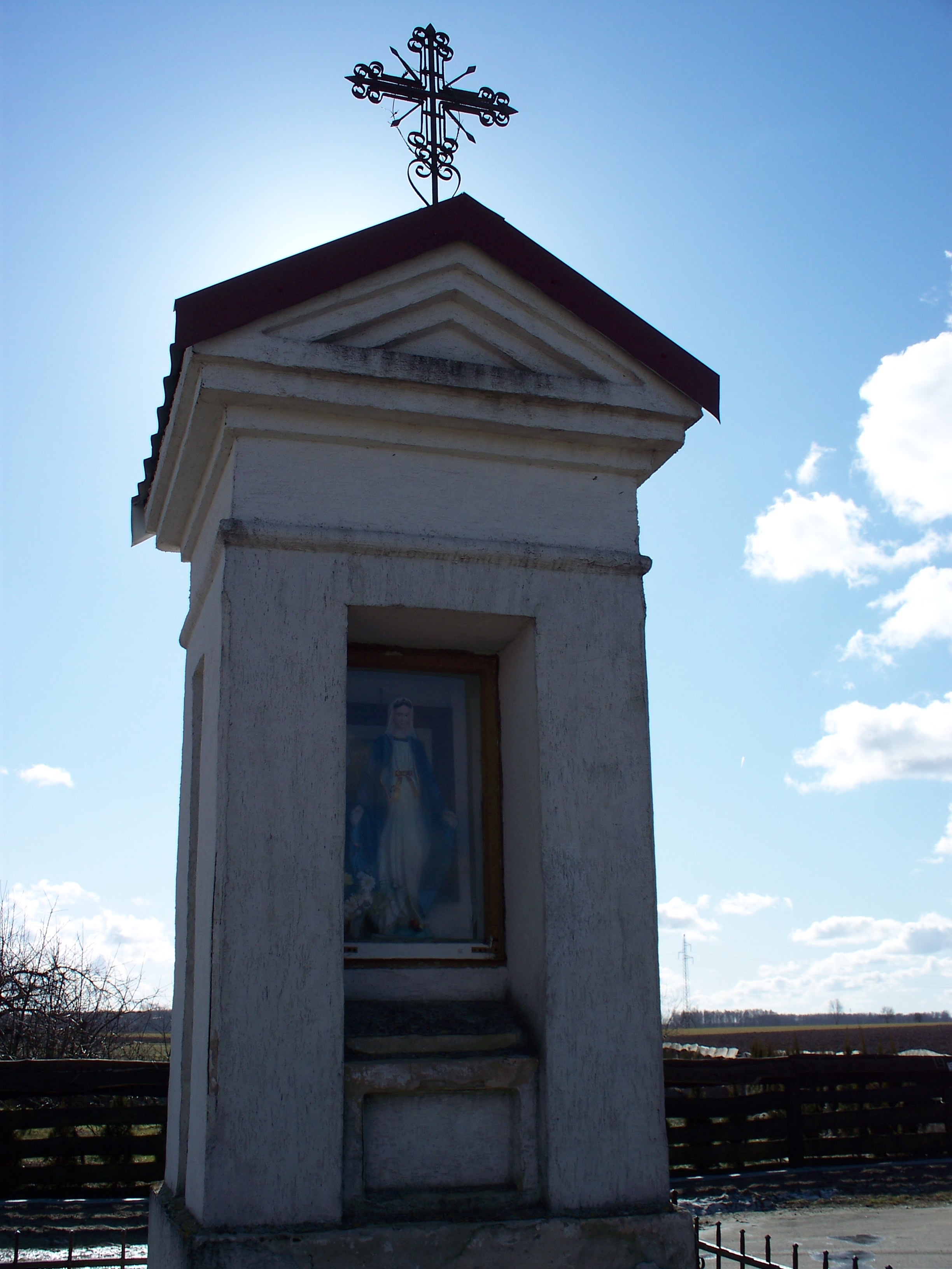 Kapliczka ta znajduje się na końcu miejscowości.